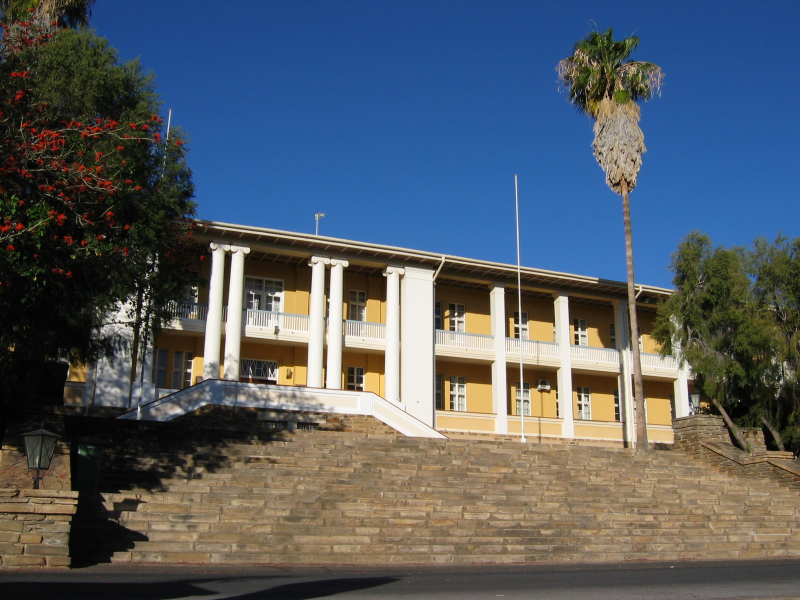 Parliament (Tintenpalast), Windhoek, Namibia